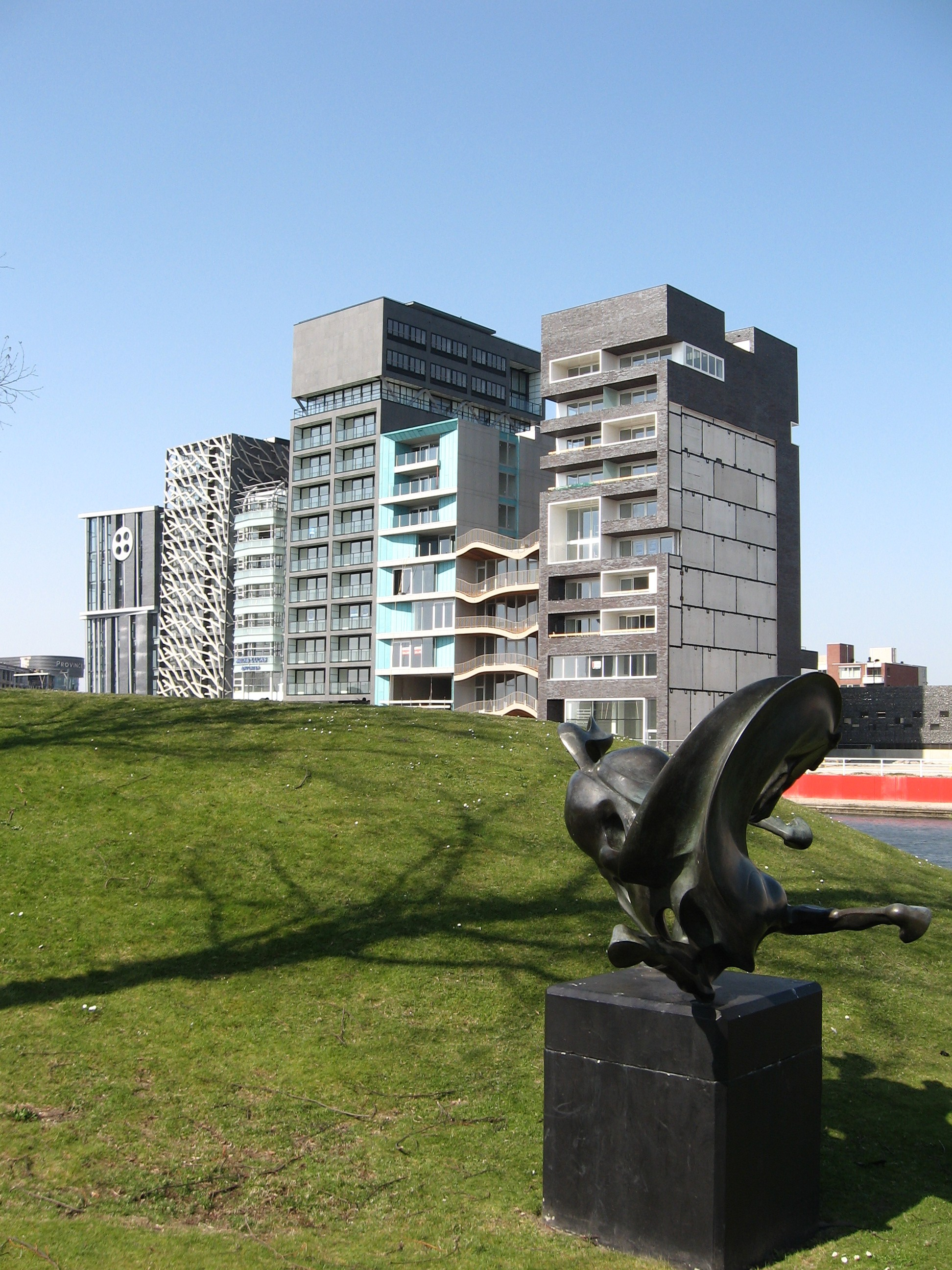 De Zilverparkkade gezien vanaf het Zilverpark. Foto: Cermivelli